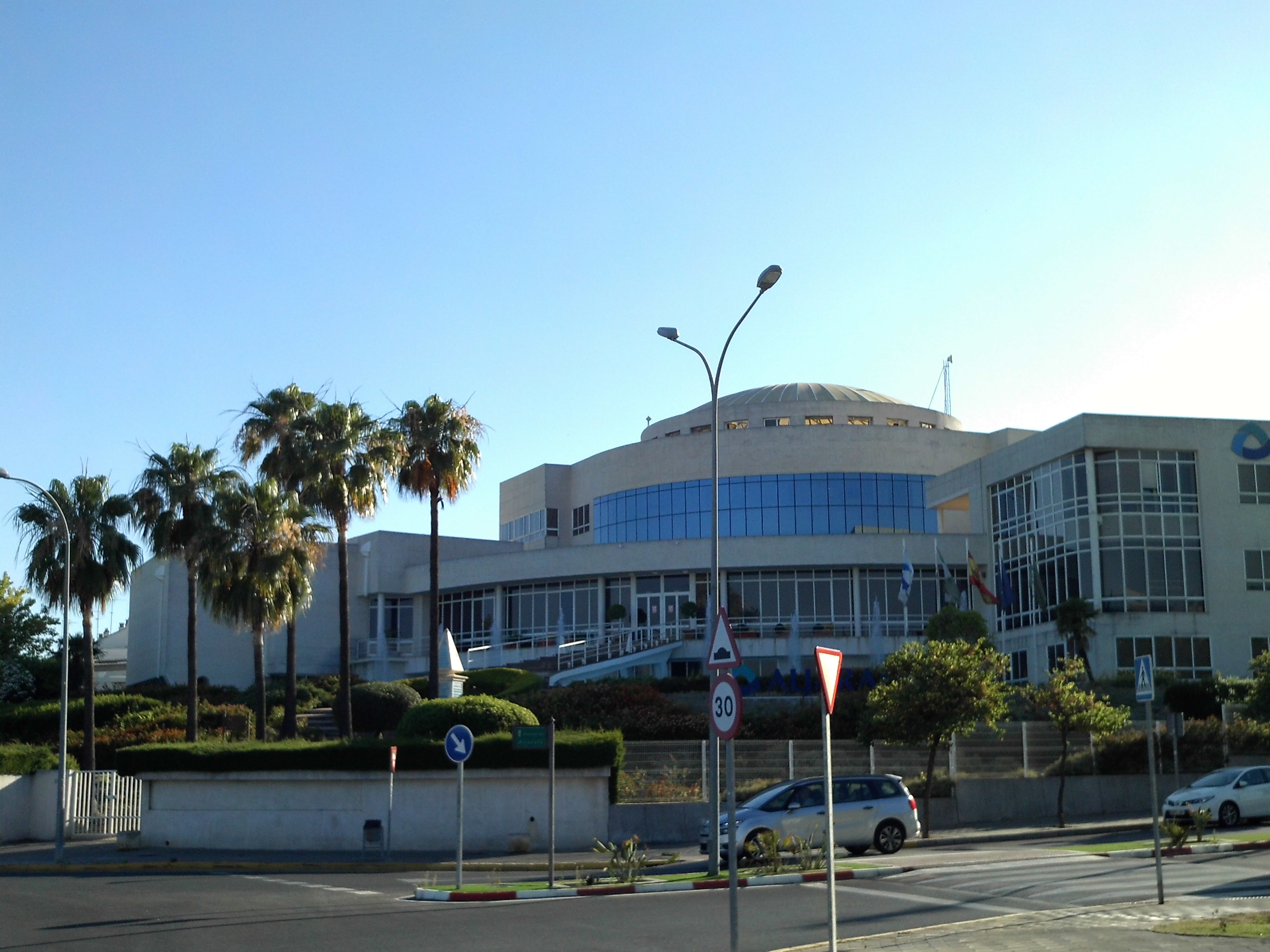 Sede de Aljarafesa. Tomares, provincia de Sevilla, Andalucía, España.